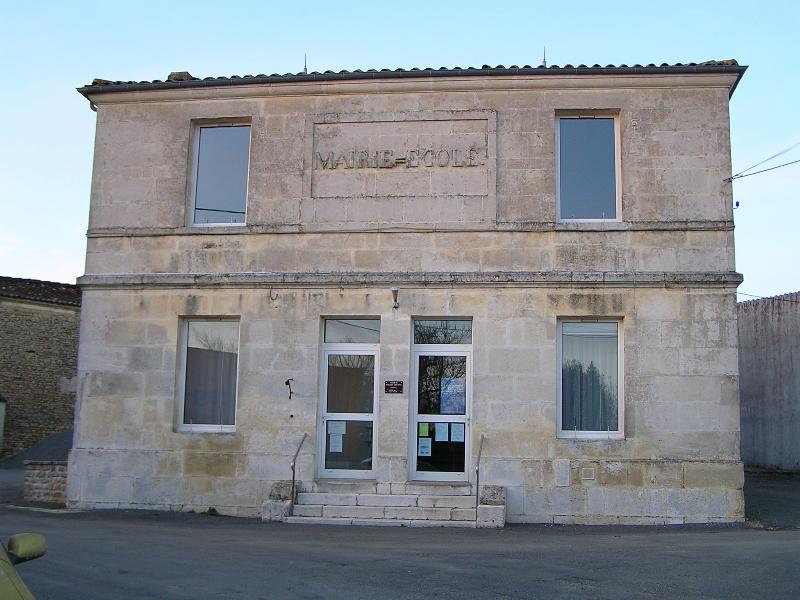 mairie de Villars les Bois